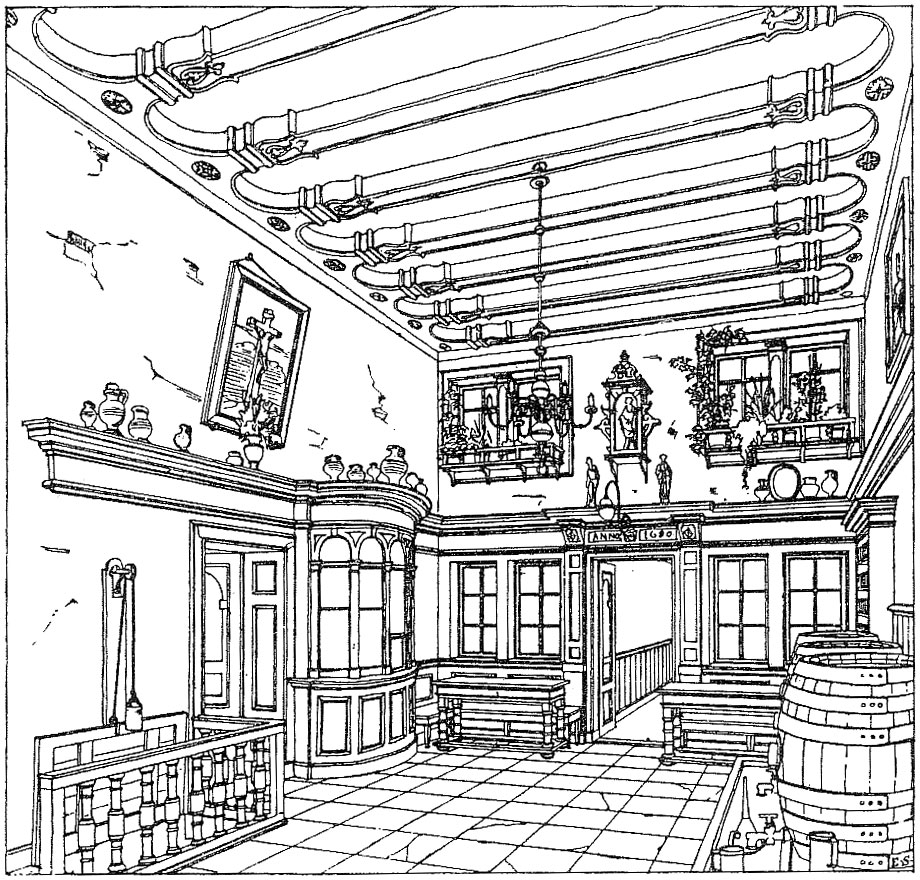 Kölnische Bierwirtschaft, Ansicht des Vorraumes mit Schenke und Thekenschaaf